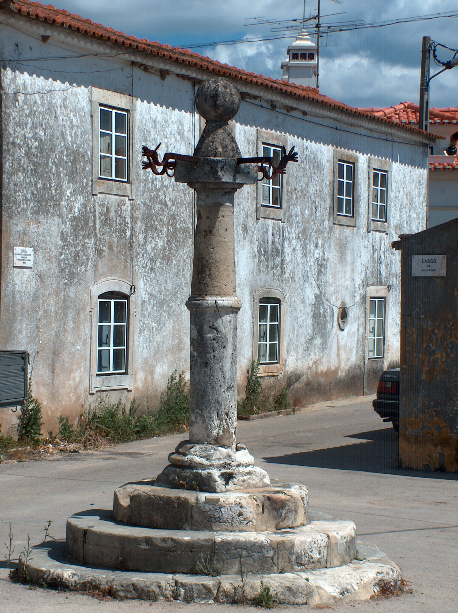 Pelourinho em Paialvo.